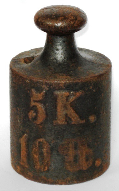 Gewicht zu 5 Kilo / 10 Pfund